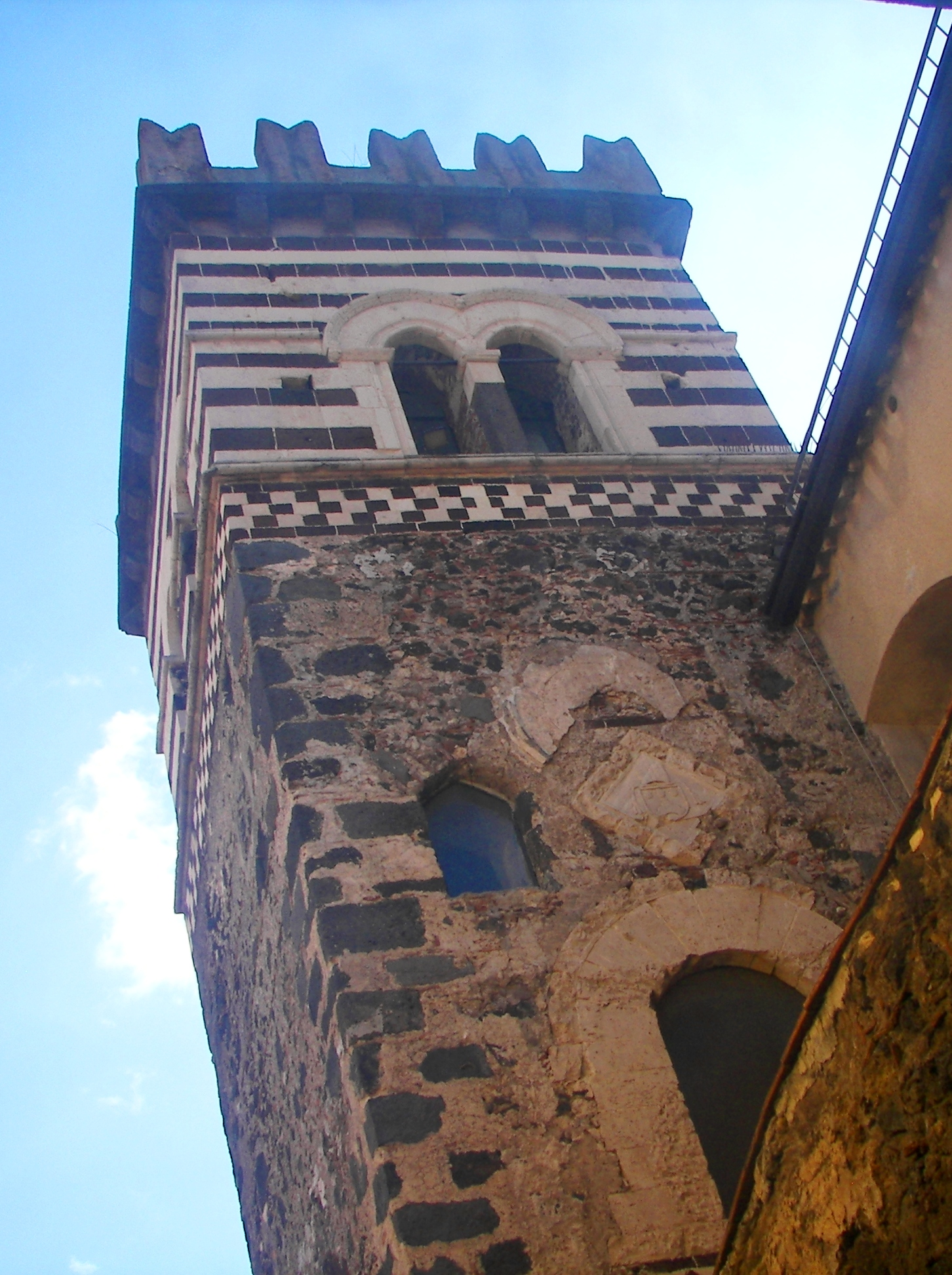 La Torre Campanaria, denominata di San Nicolò, è un magistrale esempio di architettura Normanna del 1143. Esemplare fusione tra il gotico e il romanico.